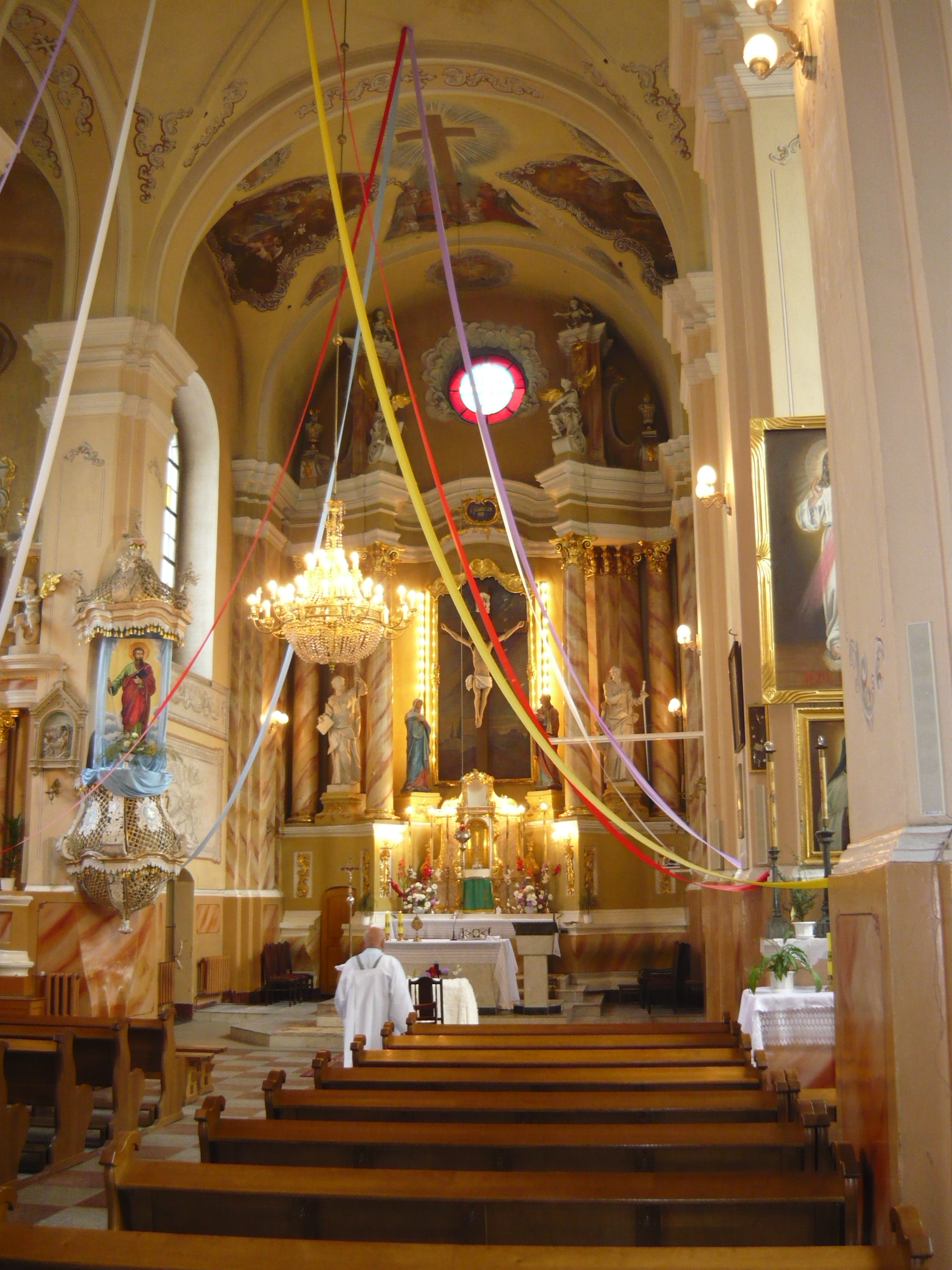 Беларуская (тарашкевіца): Касьцёл Узьвіжаньня Сьвятога Крыжадэкаратыўнае аздабленьне інтэр’еру:тры алтары і амбон, арнамэнтальная лепка, росьпісы скляпеньняў і сьцен. г. Ліда This is a photo of Belarusian heritage monument. Reference number: 412Г000335 ( WLM)